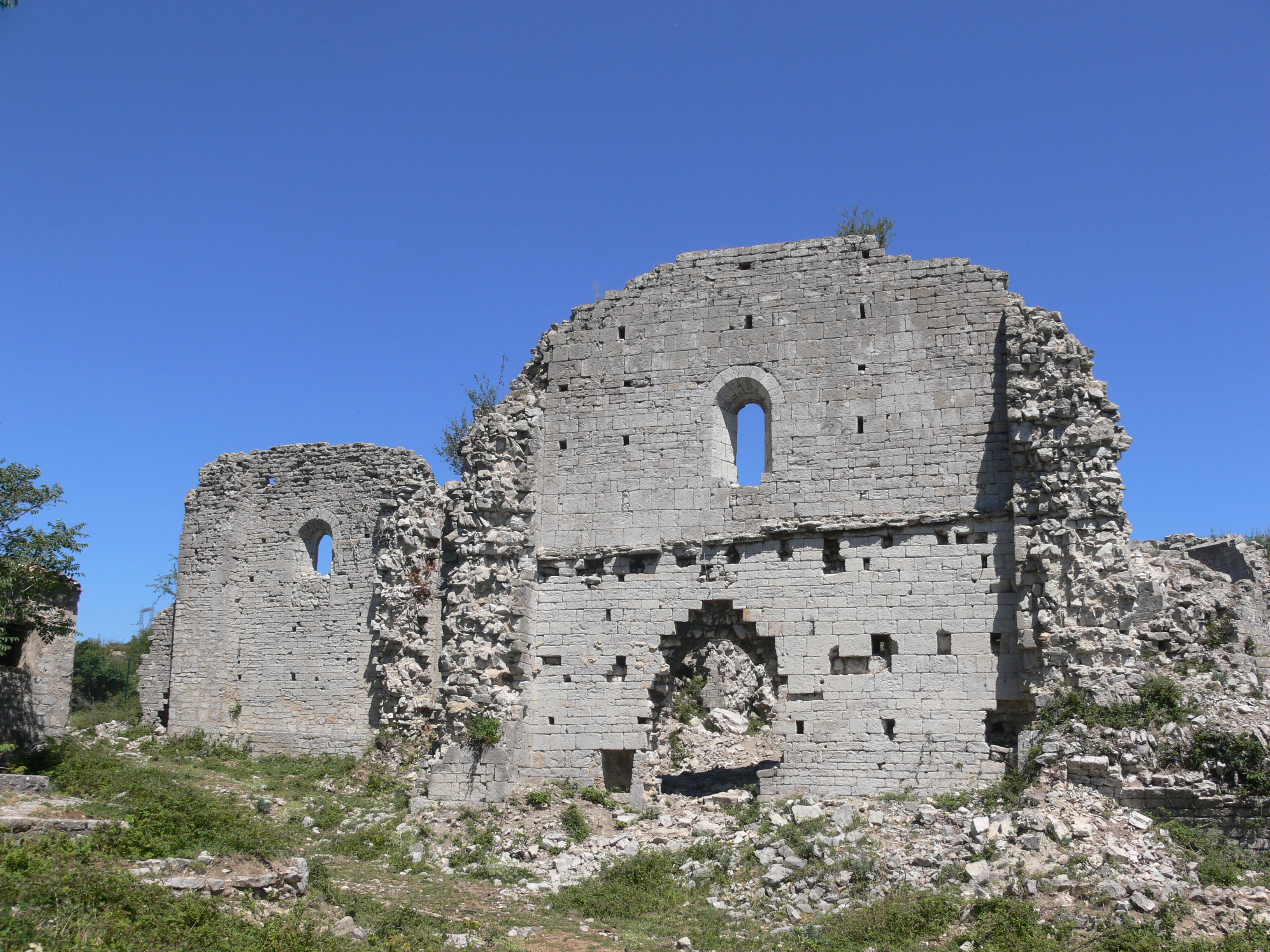 Abbaye Saint-Pierre de Rompon, (Inscrit, 1927) .